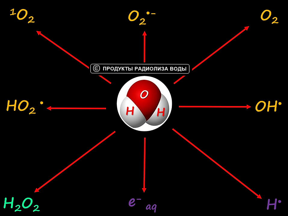 Продукты радиолиза воды. Окислители (сверху) и восстановители (снизу). Пероксид водорода в зависимости от условий среды может быть окислителем или восстановителем.